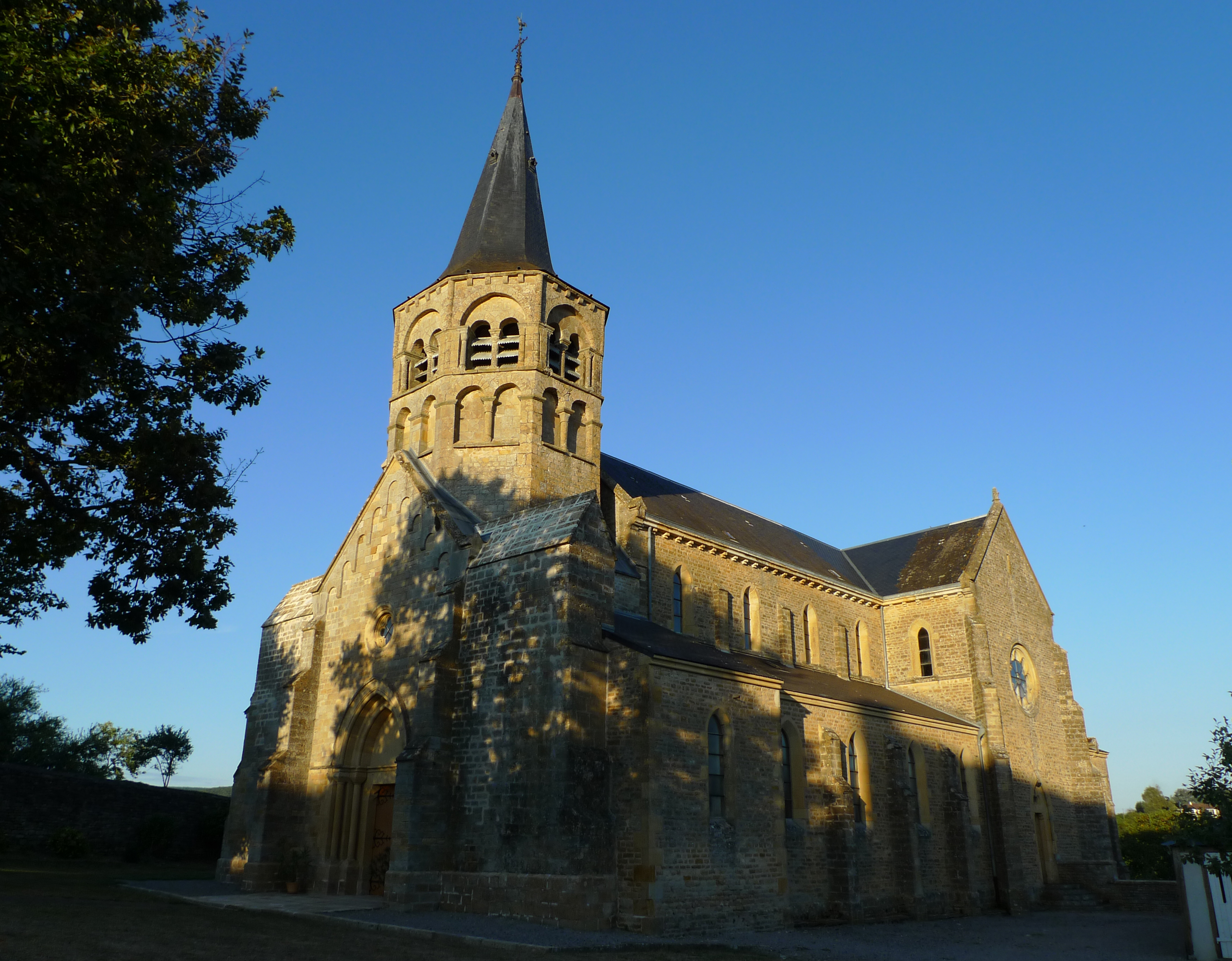 Église Saint-Sulpice de Saint-Sulpice, (Inscrit, 1959) .